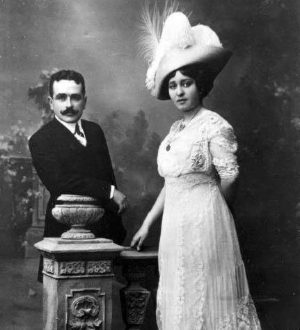 Getúlio Vargas e Darci Vargas, meses após o casamento.